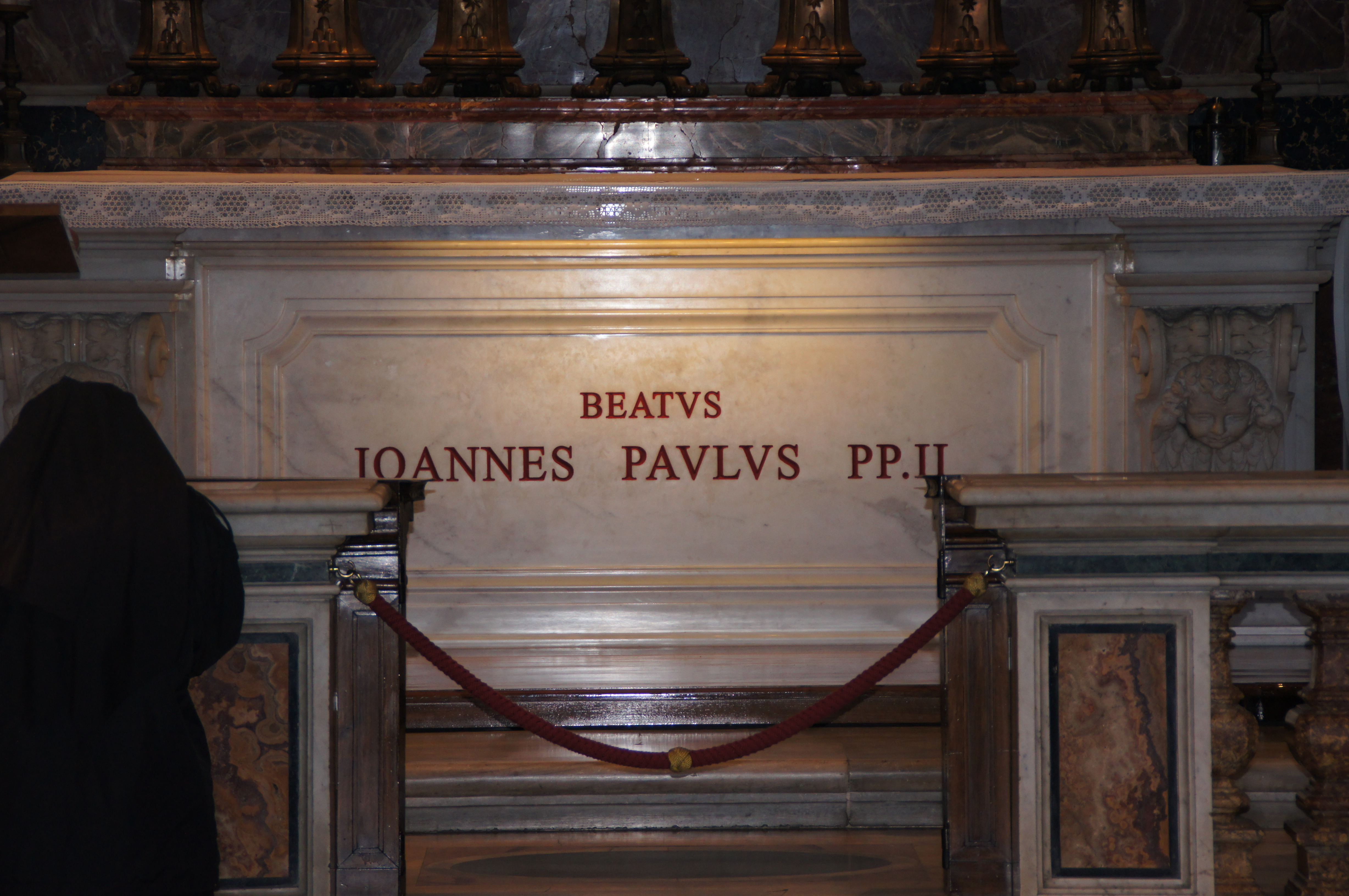 Tomba di Papa wojtyla